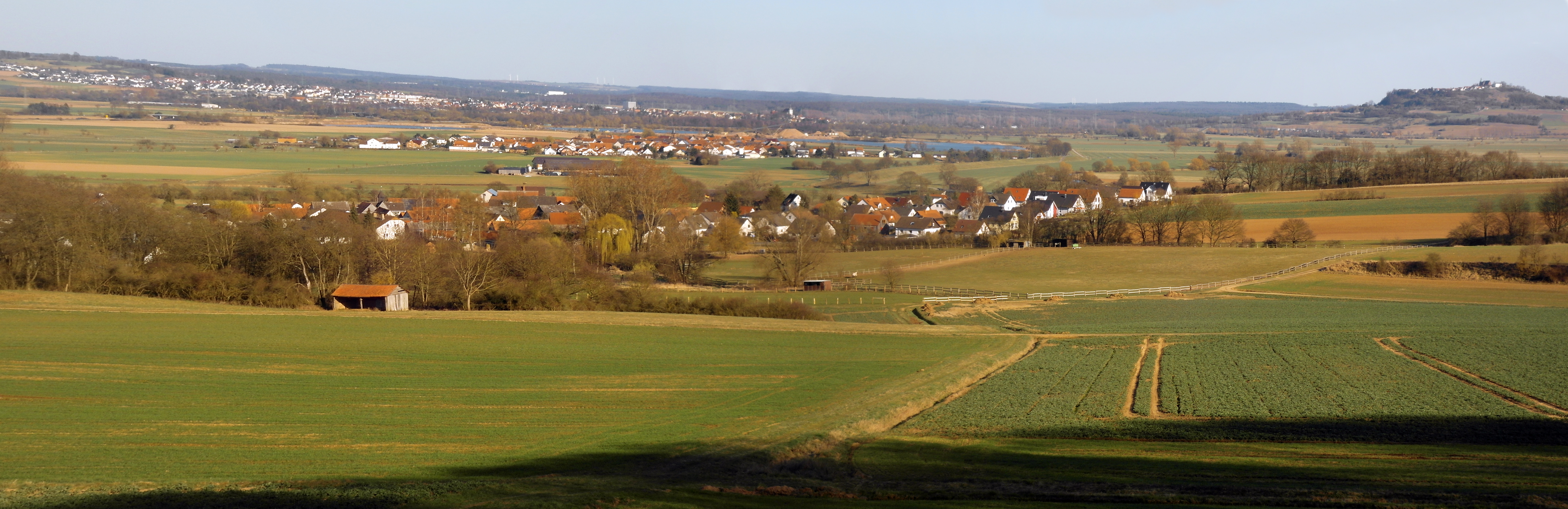 Panorama von Schönbach. Im Hintergrund die Amöneburg